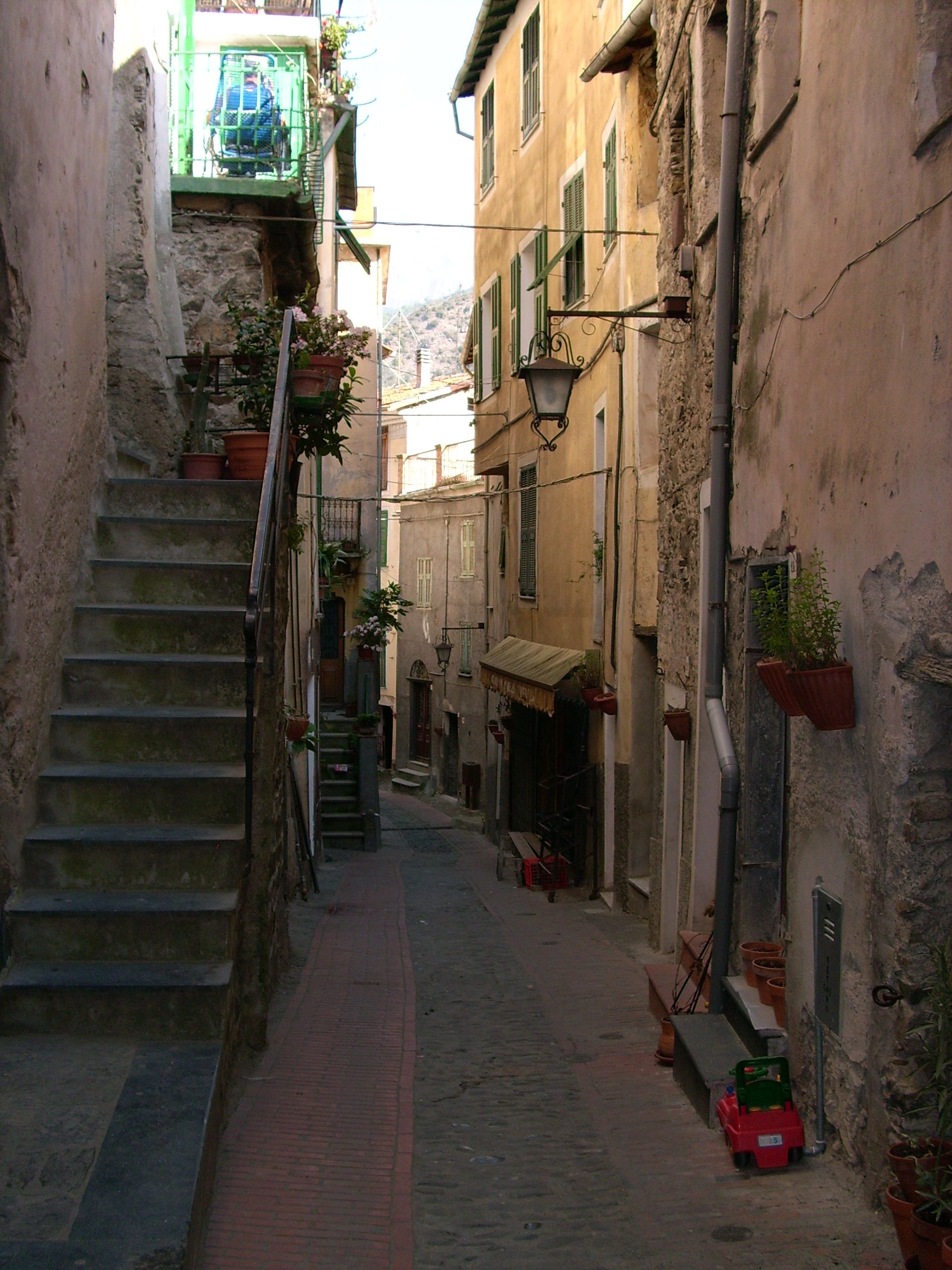 Castel Vittorio, Liguria, Italia